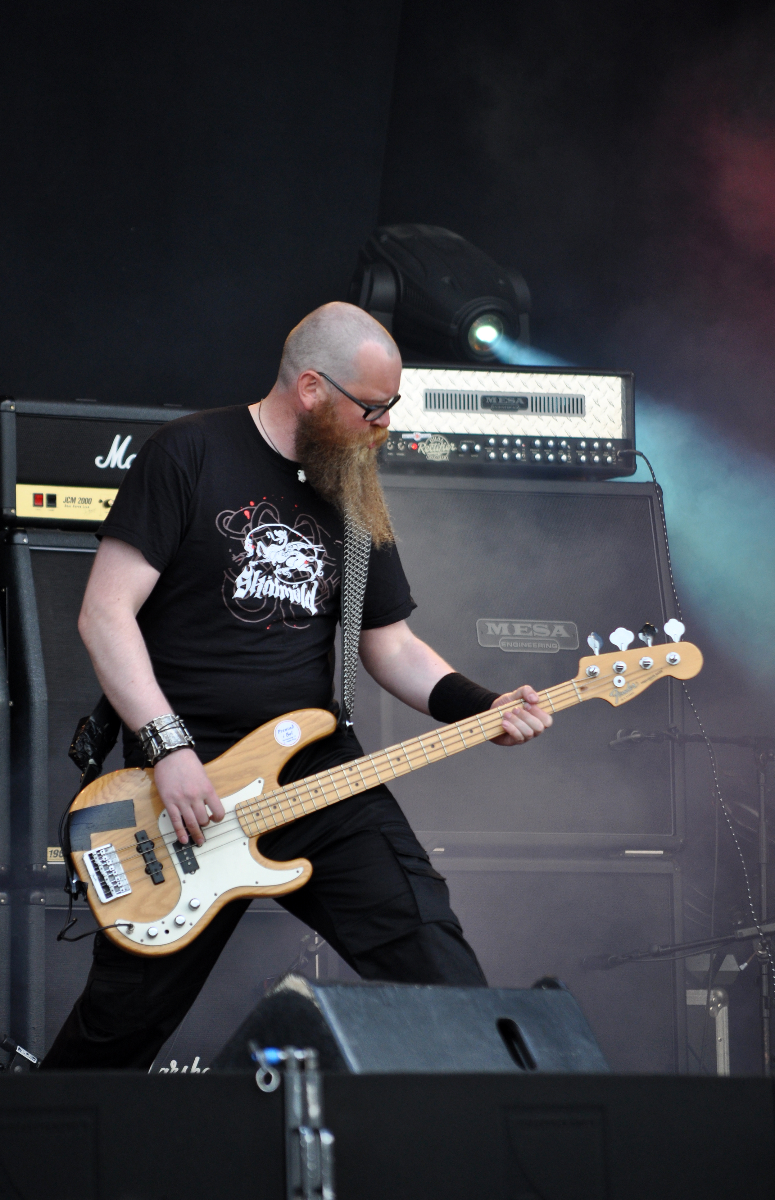 Skálmöld at Party.San Open Air 2012